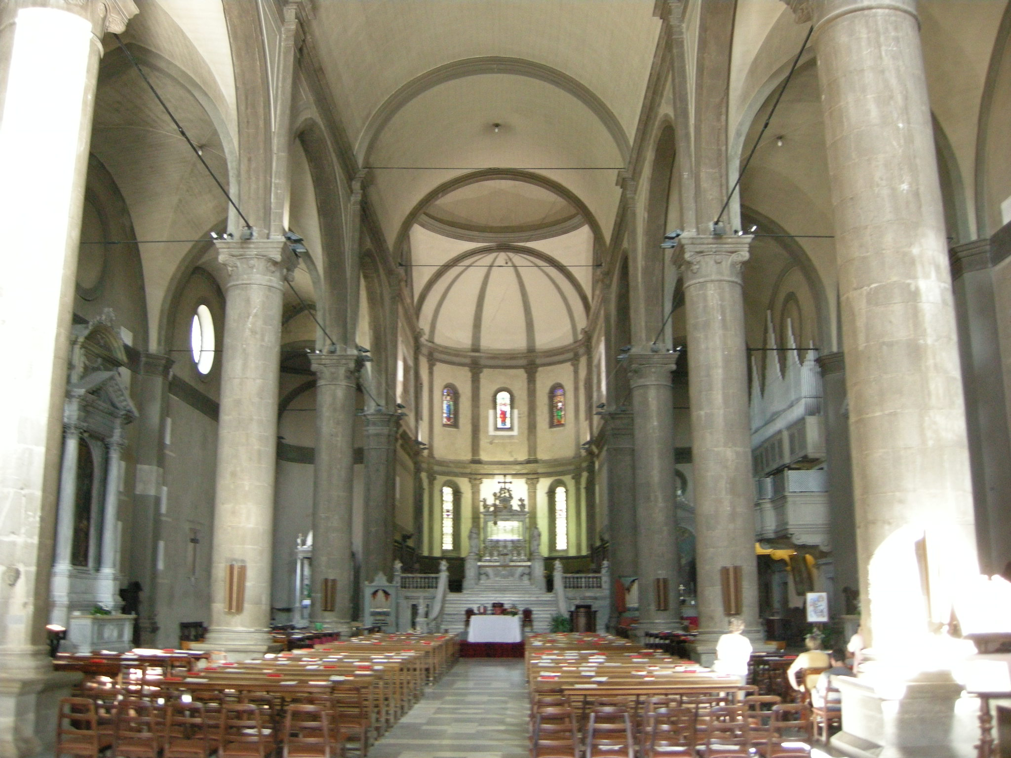 Cividale, duomo, interno